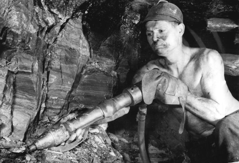 Oelsnitz, Steinkohlewerk, Bergarbeiter bohrend Zentralbild Schlegel We 4.10.57 Zur Auszeichnung als "Held der Arbeit" vorgeschlagen: Flanze, Walter, geb.: 12.3.1913, Hauer im VEB Steinkohlenwerk "Karl-Liebknecht" Oelsnitz.